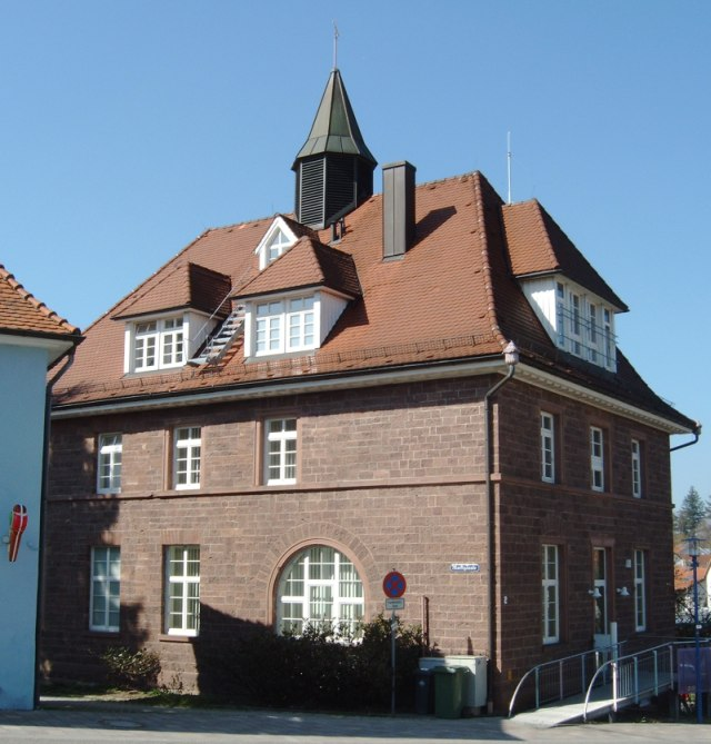 Altes Rathaus in Waldbronn-Reichenbach; jetzt Polizei Albtal